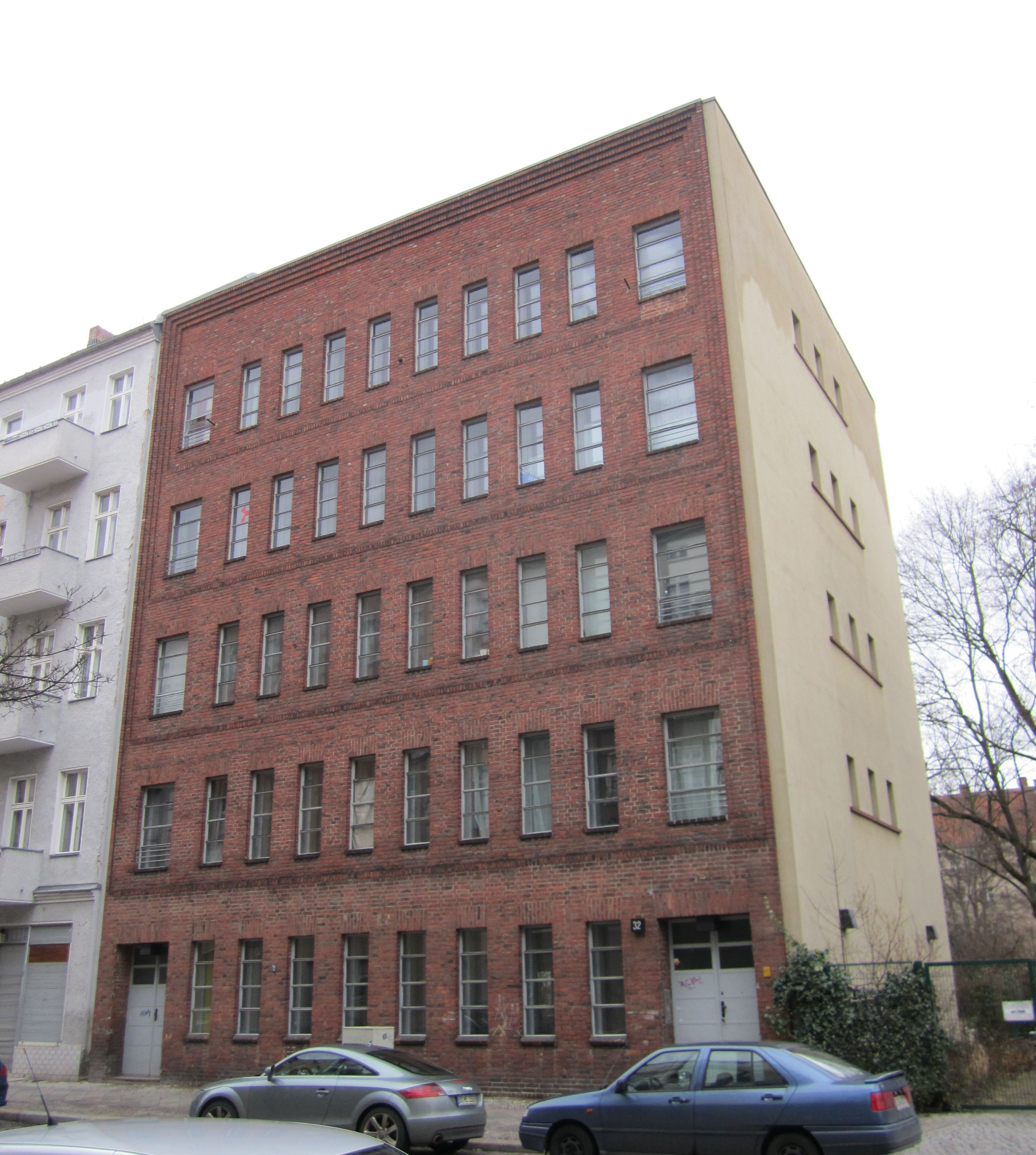 Haus Brüsseler Straße 32 ("Stützpunkt Zeppelin"), Berlin.